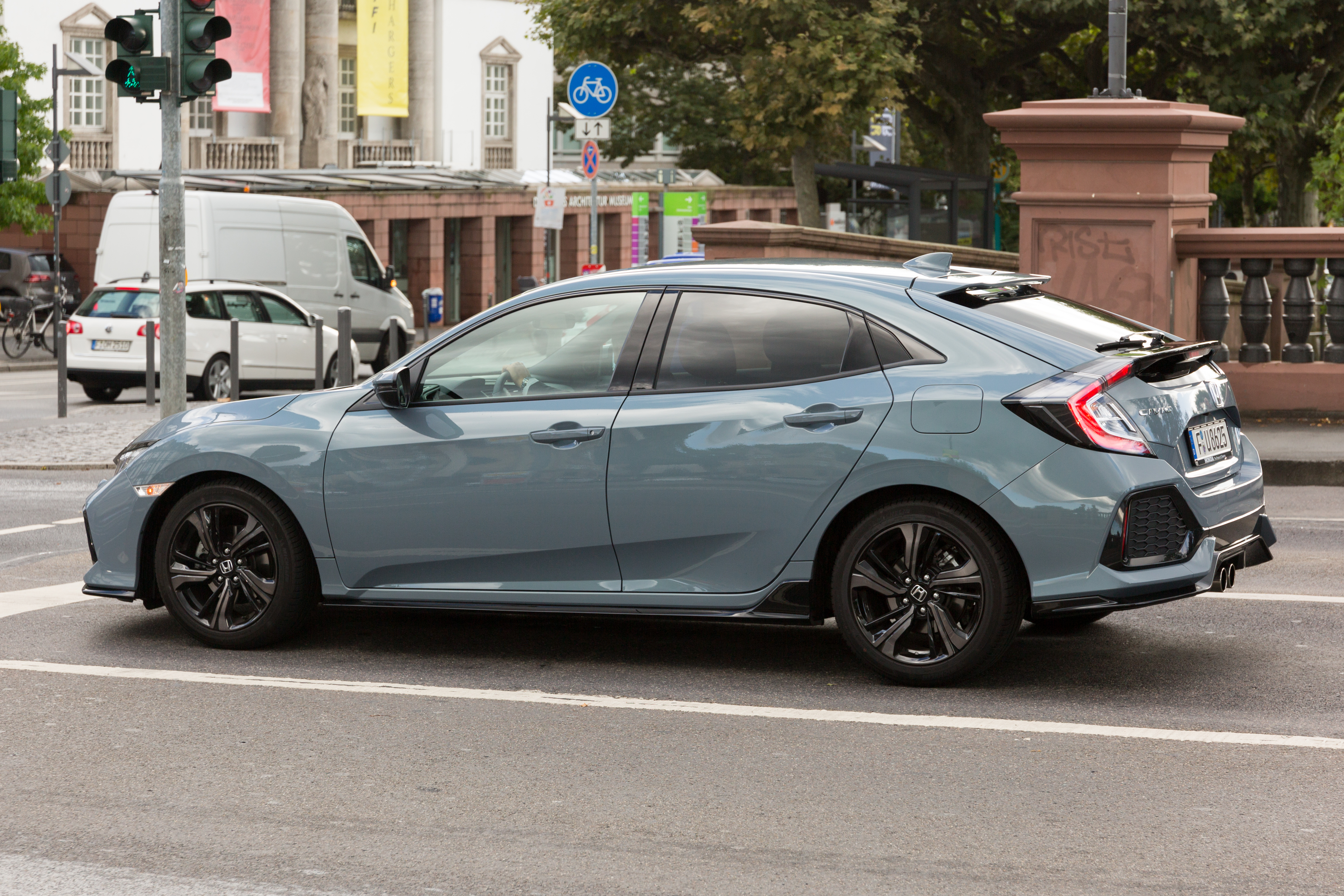 Honda Civic